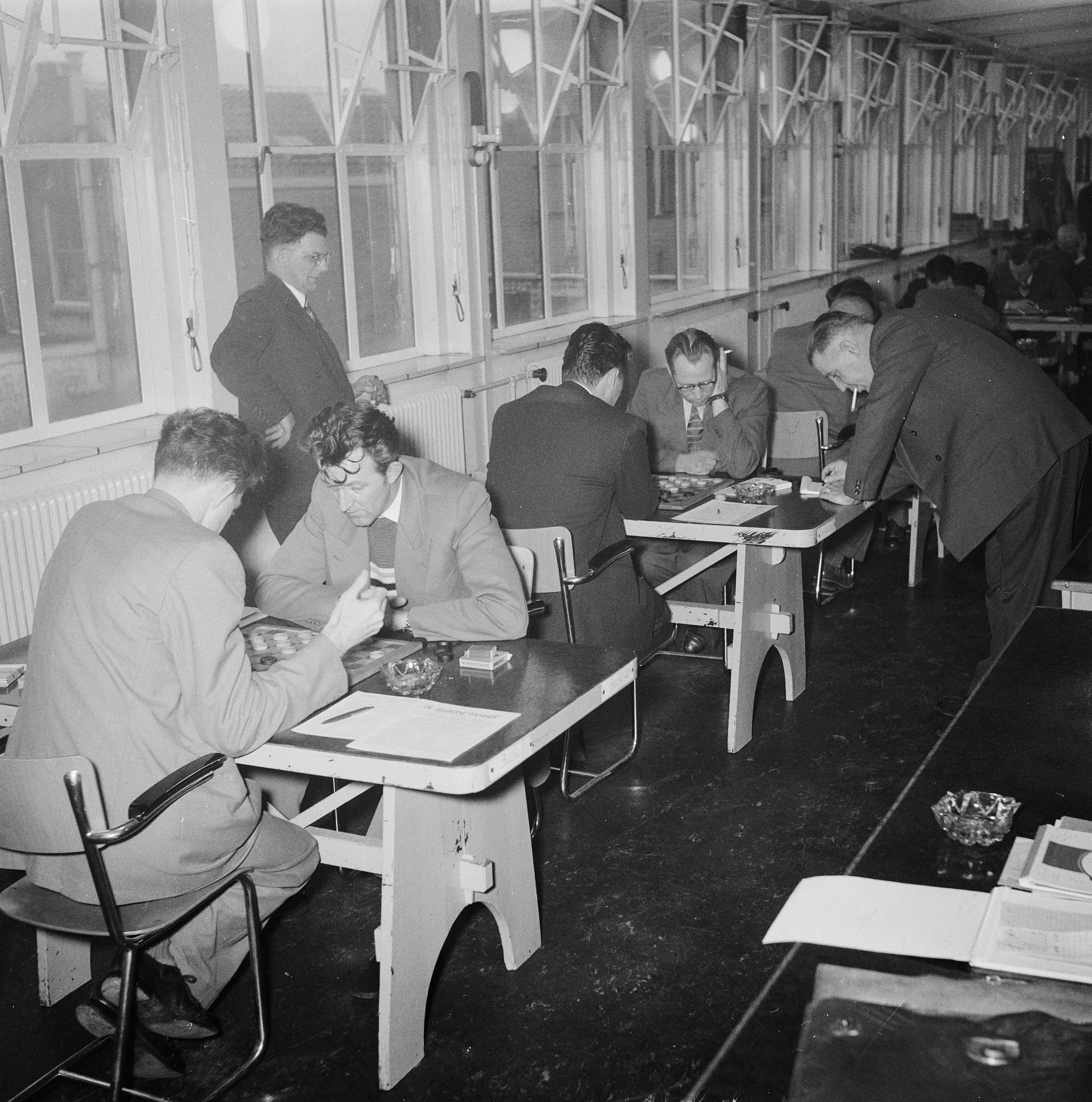 Collectie / Archief : Fotocollectie Anefo Reportage / Serie : [ onbekend ] Beschrijving : Damkampioenschap Nederland, overzicht Datum : 14 januari 1956 Locatie : Nederland Trefwoorden : Overzichten, damkampioenschappen Fotograaf : Rossem, Wim van / Anefo Auteursrechthebbende : Nationaal Archief Materiaalsoort : Negatief (zwart/wit) Nummer archiefinventaris : bekijk toegang 2.24.01.03 Bestanddeelnummer : 907-5411